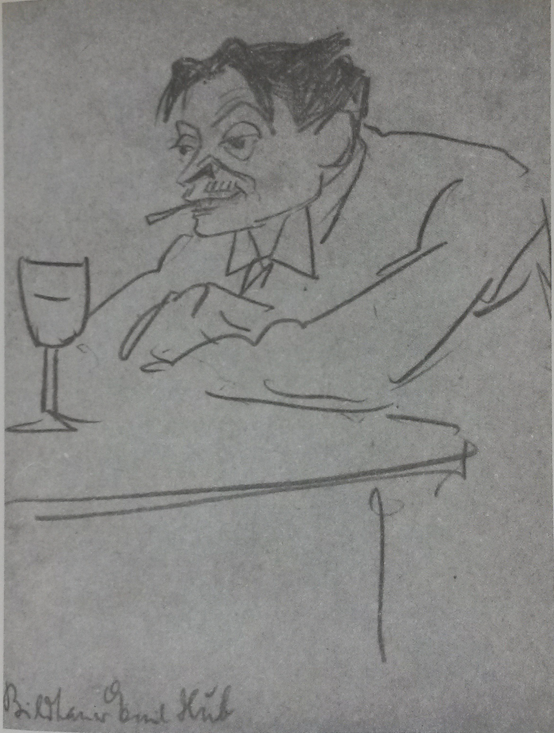 Darstellung von Emil Hub durch Lino Salini.